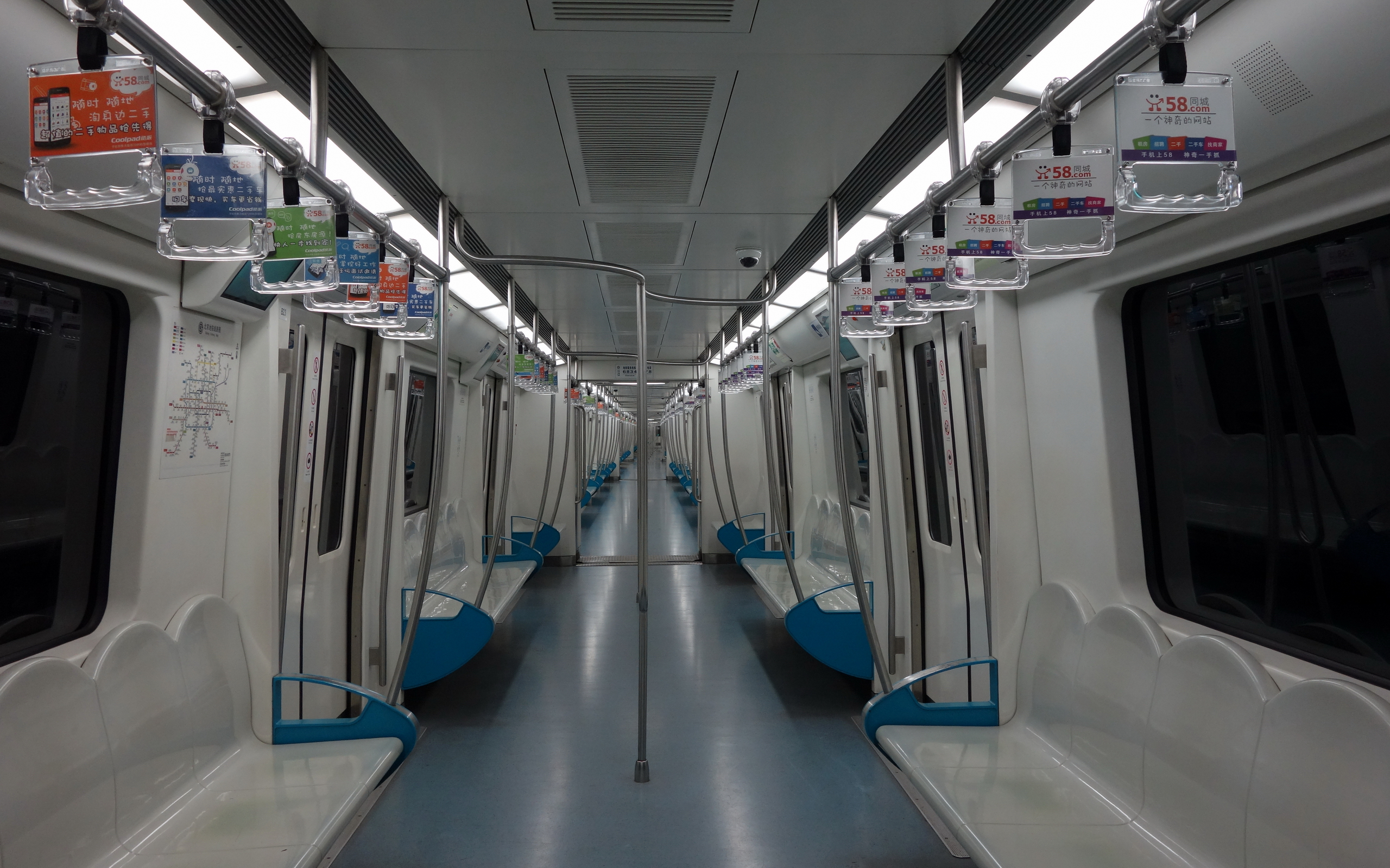 北京地铁10号线列车内部